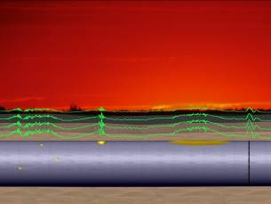 Measured magnetic field as it is recorded by magnetometer device.